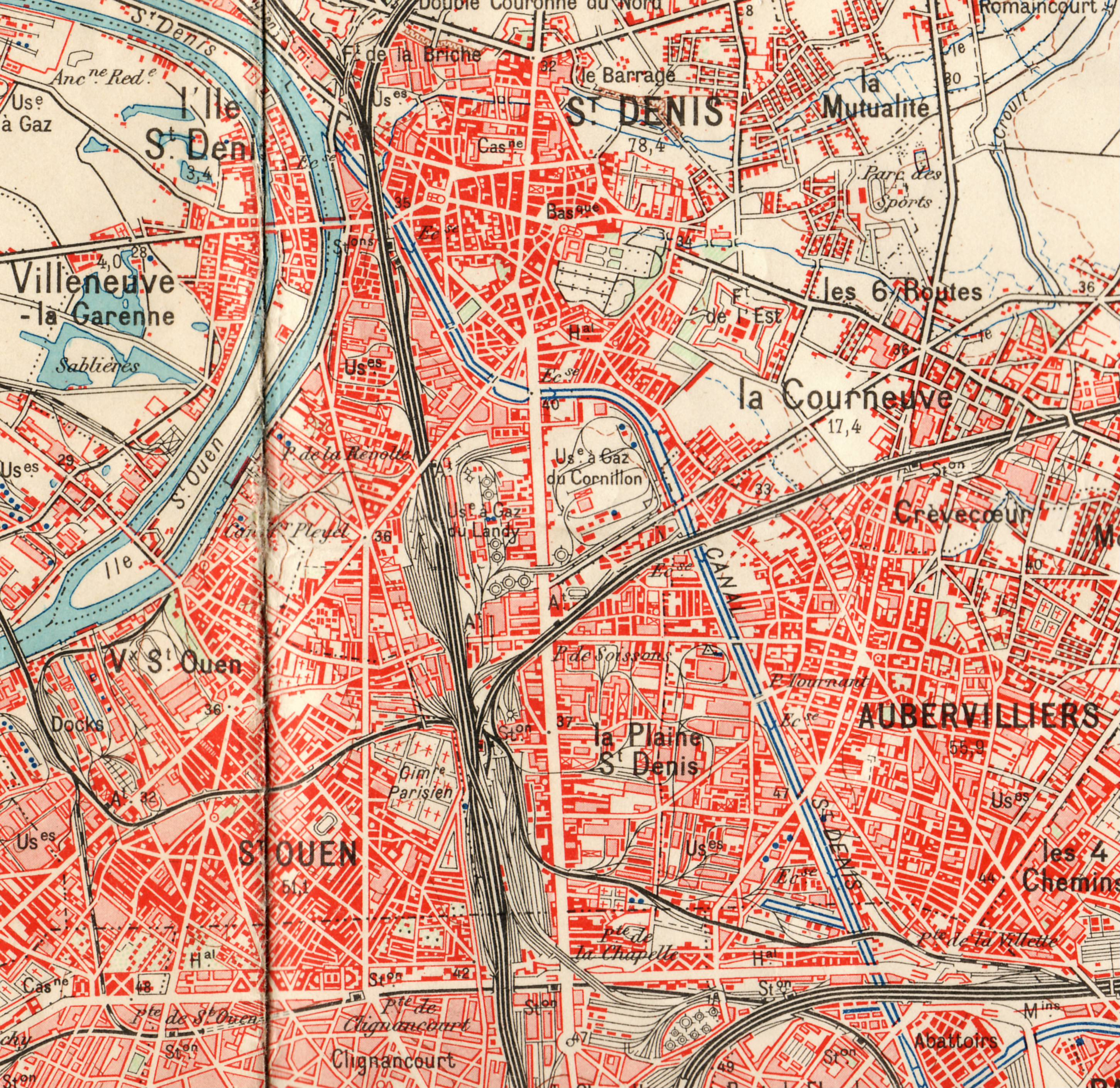 Extrait de la Carte IGN Paris 1/50.000 (type 1922), levée en 1872-79 révisée en 1936